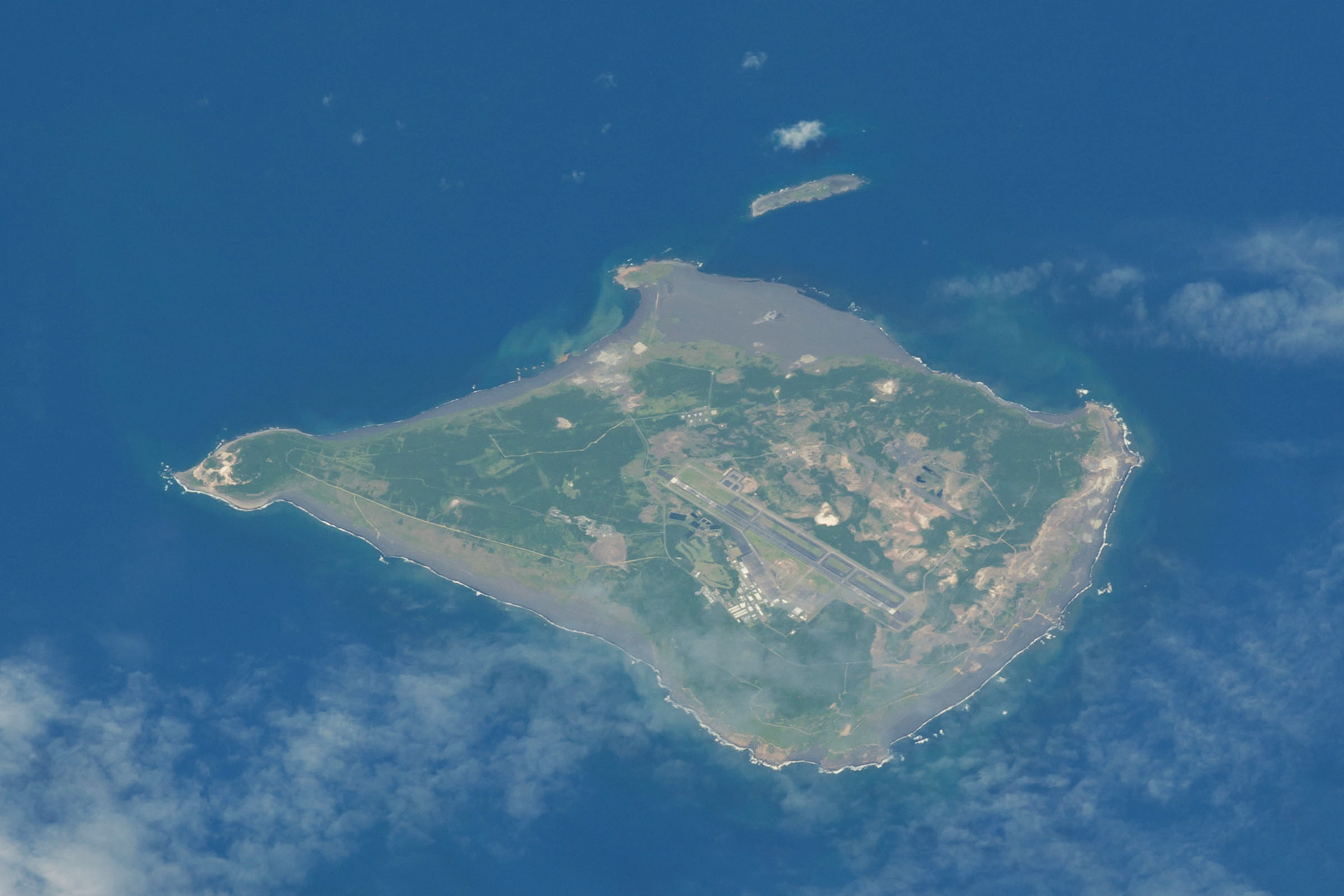 硫黄島 - 国際宇宙ステーションから2016年9月11日撮影